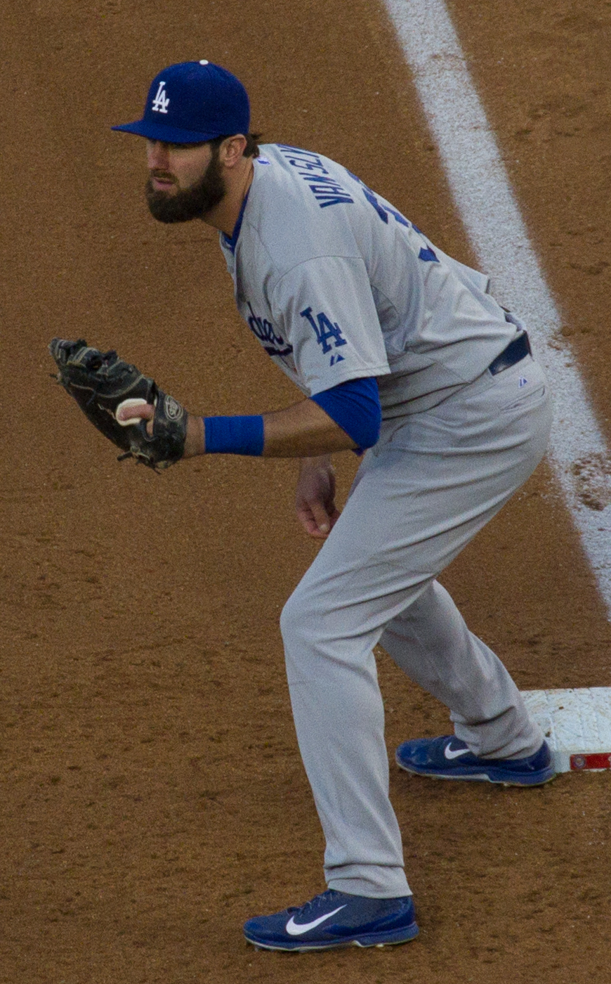 Scott Van Slyke